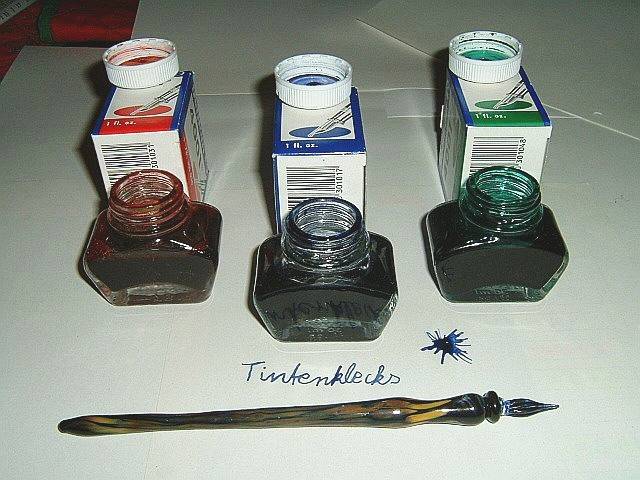 selbst fotografiert am 26.9.04, PD, GNU-FDL. Bild: § Tintengläser mit farbiger Tinte, Glasfederhalter, Schrift in Tinte :Tintenklecks Inhalt: inkglasses, penholder with glaspen, Lizenz